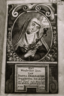 Voorpagina boek over Joanna Dedemaecker